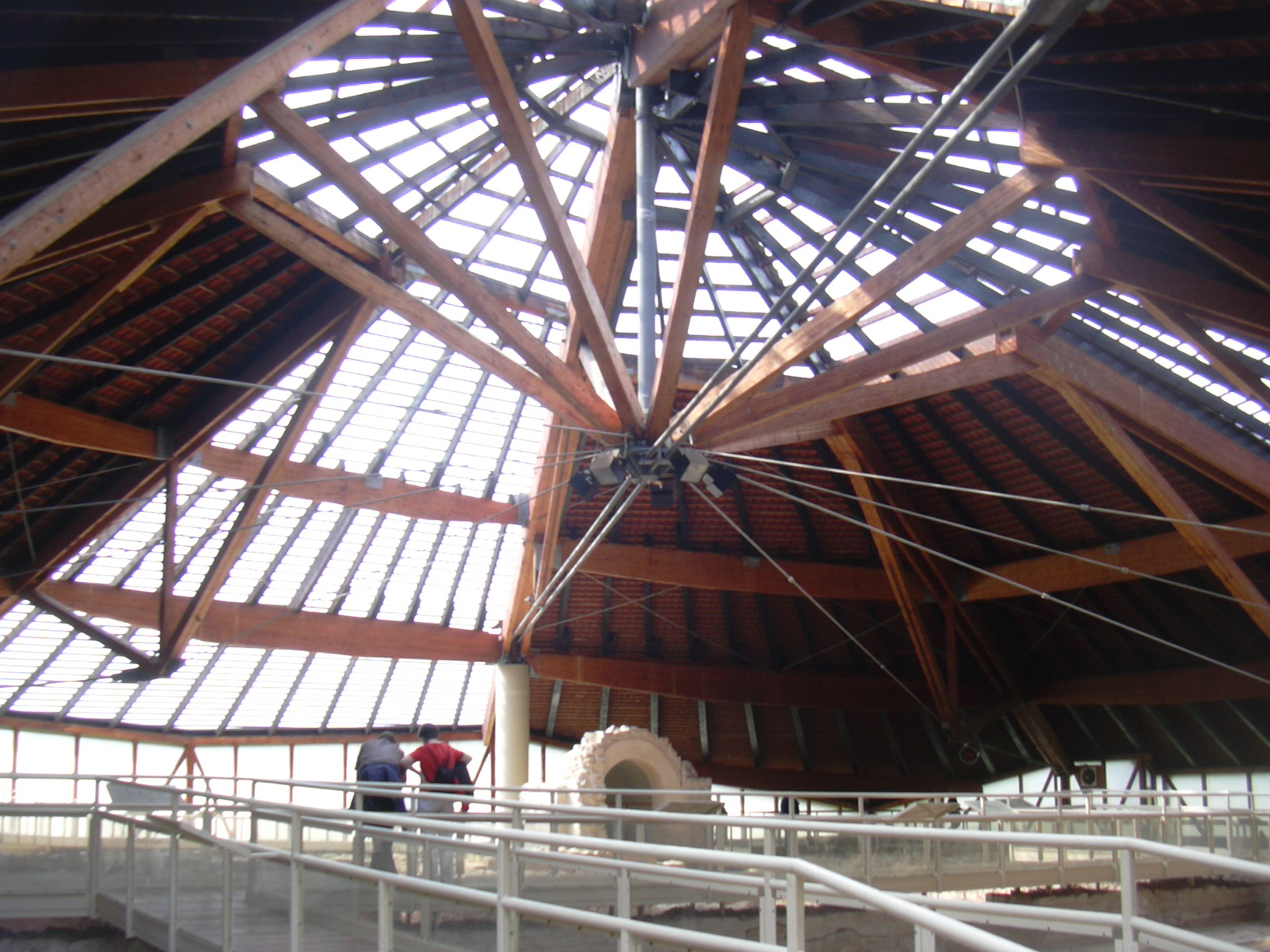 Weißenburg, Roman Bath, Bavaria/Germany